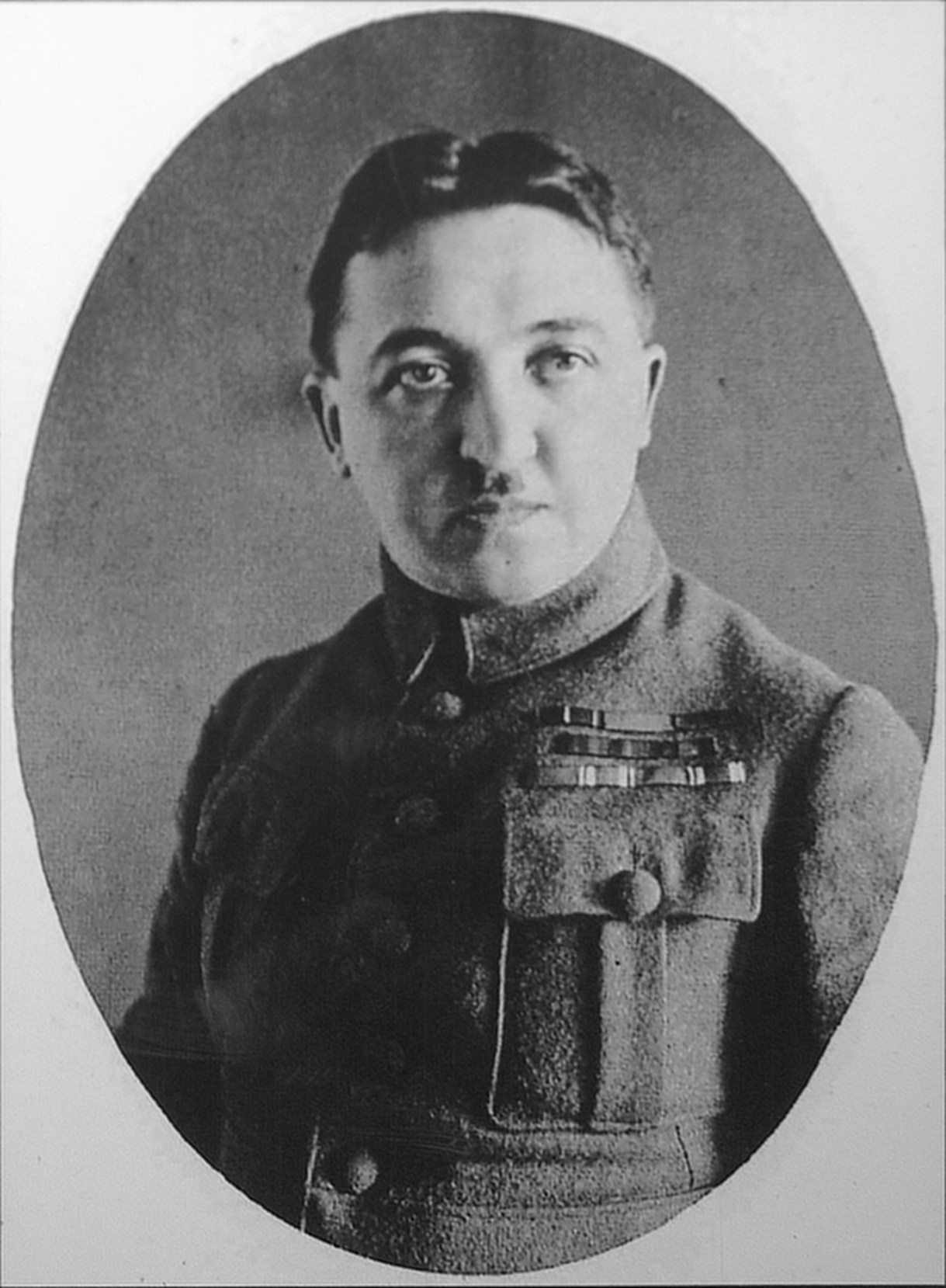 Капитан чешской армии Станислав Чечек